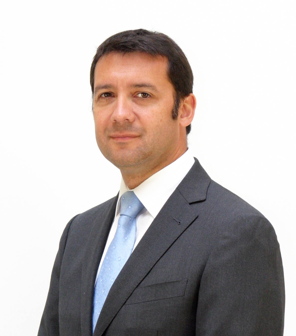 Claudio Raddatz